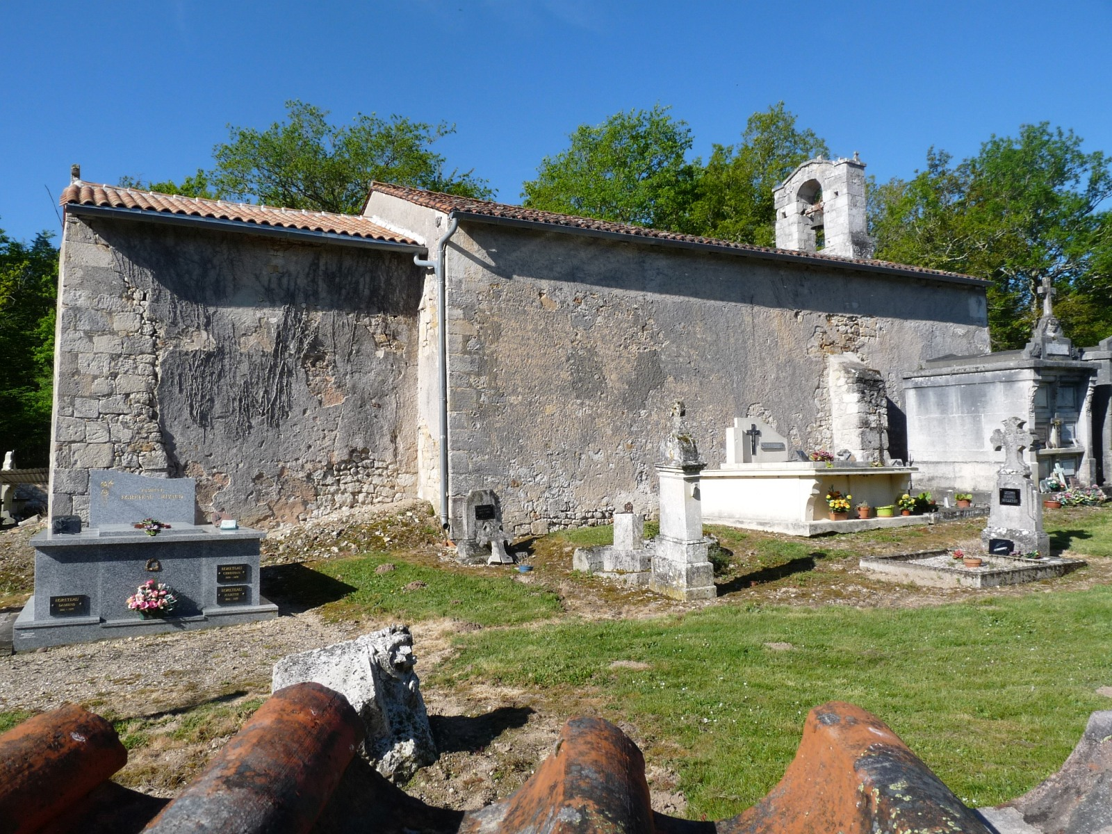 Chapelle de Guizengeard, Charente, France